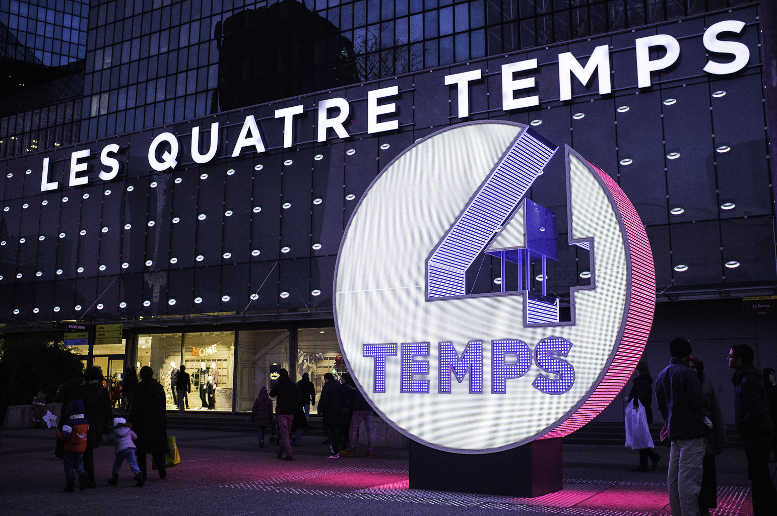 L'entrance du centre commercial "Les Quatre Temps", la Défense